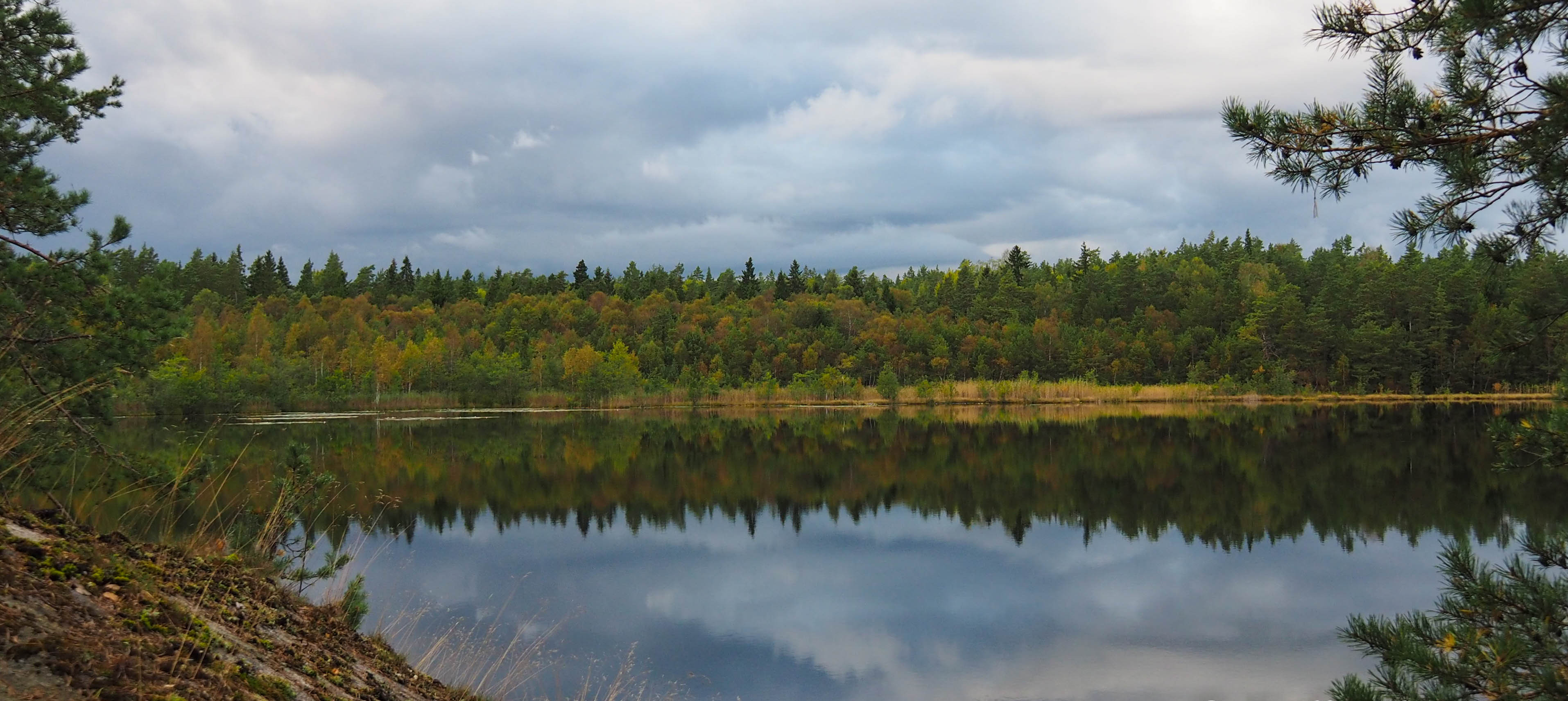 Dammstakärret